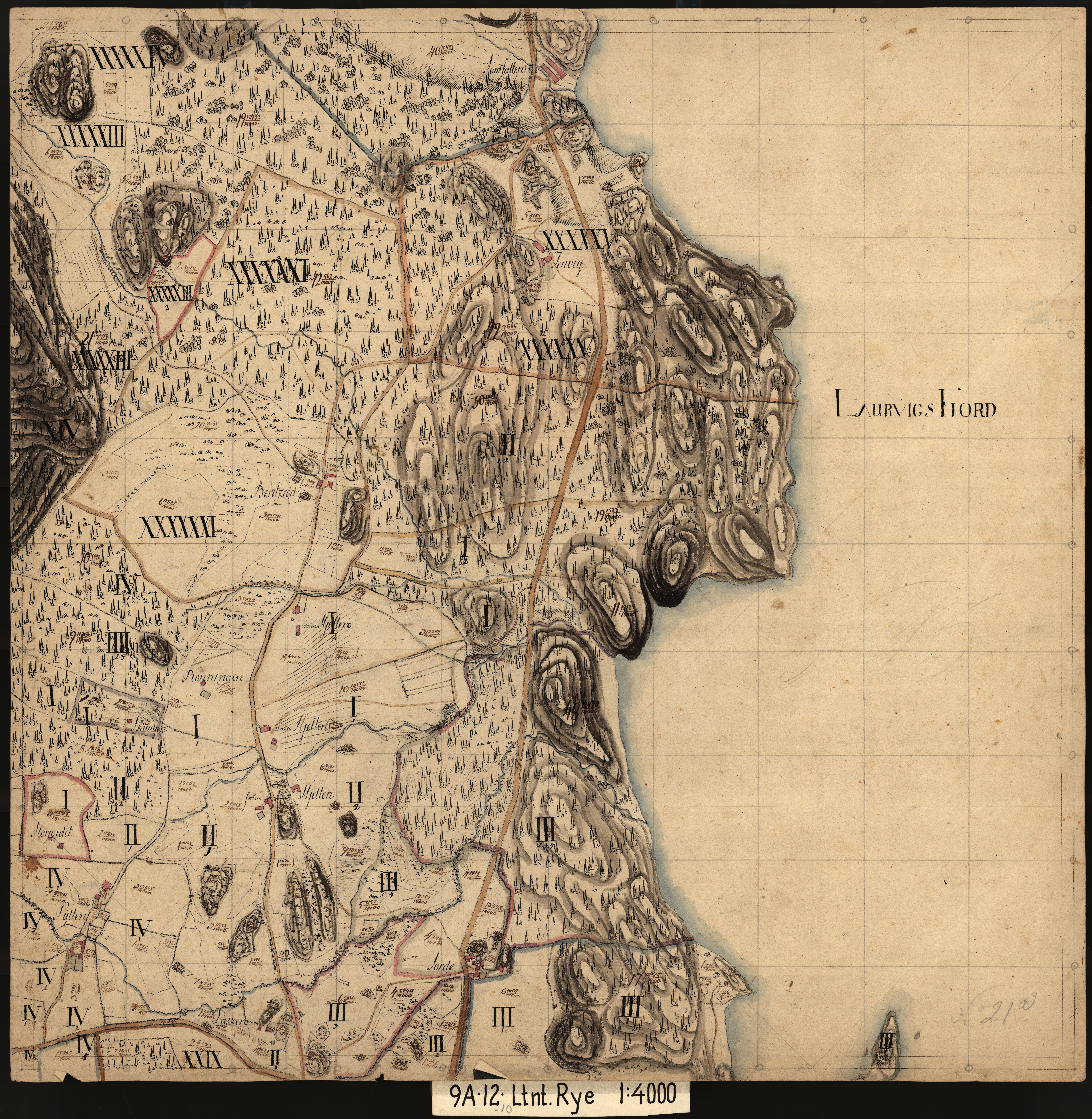 Usikkert produksjonsår.